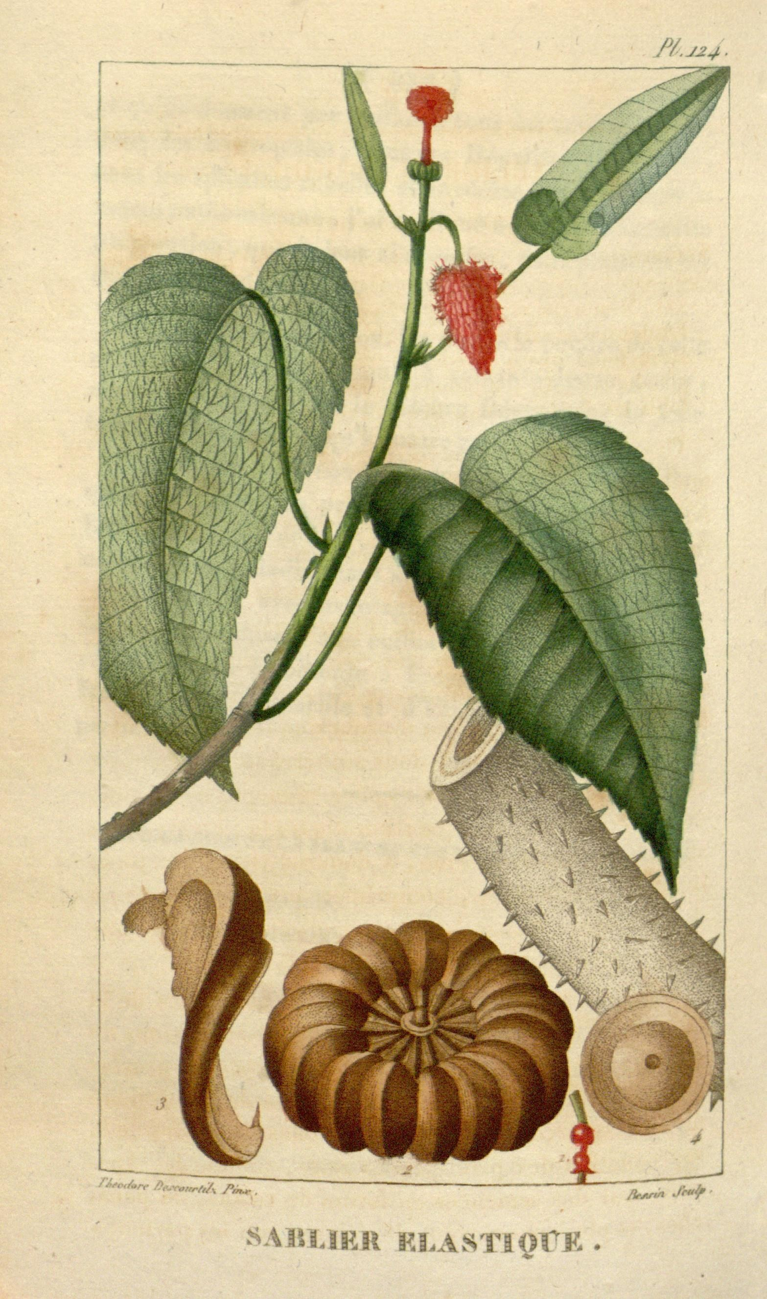 fl. J24- I rÀétné^rr /Wv.,«r/vA /*«.*■ . /ieJtrin .^*^ î^ABTJER Rî,A?^TI^^rK . "Sablier élastique"